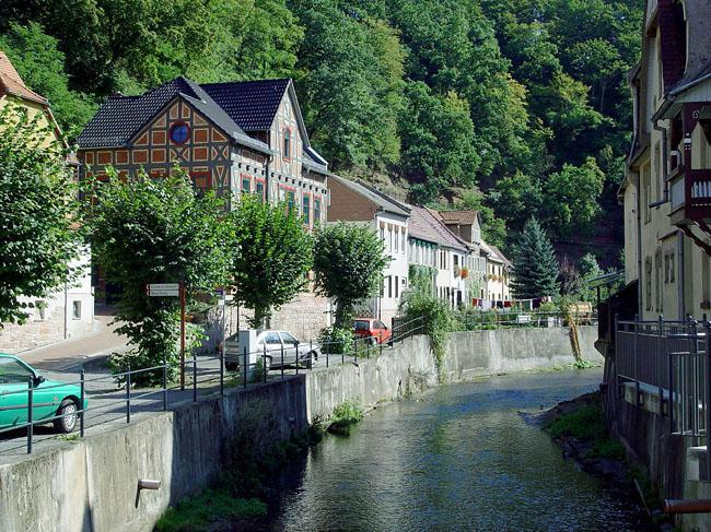 Der Fluss Roda in Stadtroda